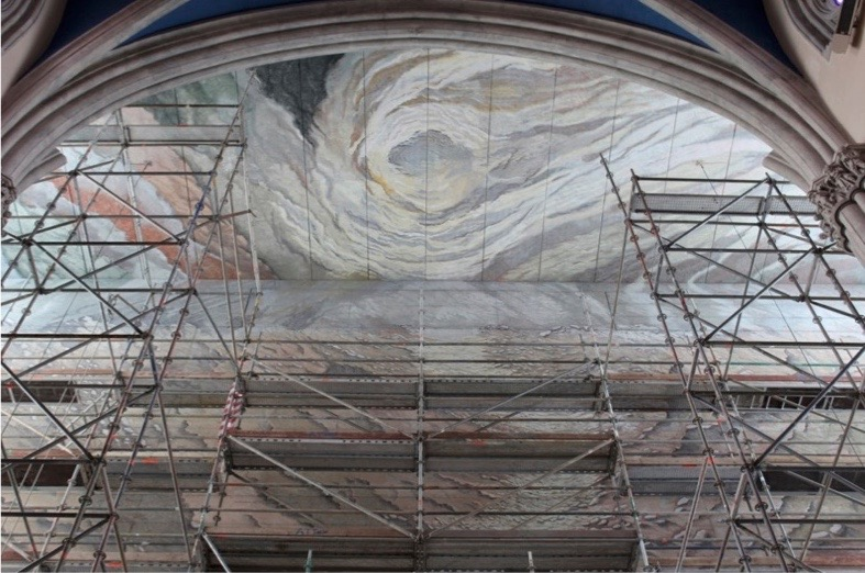 Procés en realitzar una pintura mural.